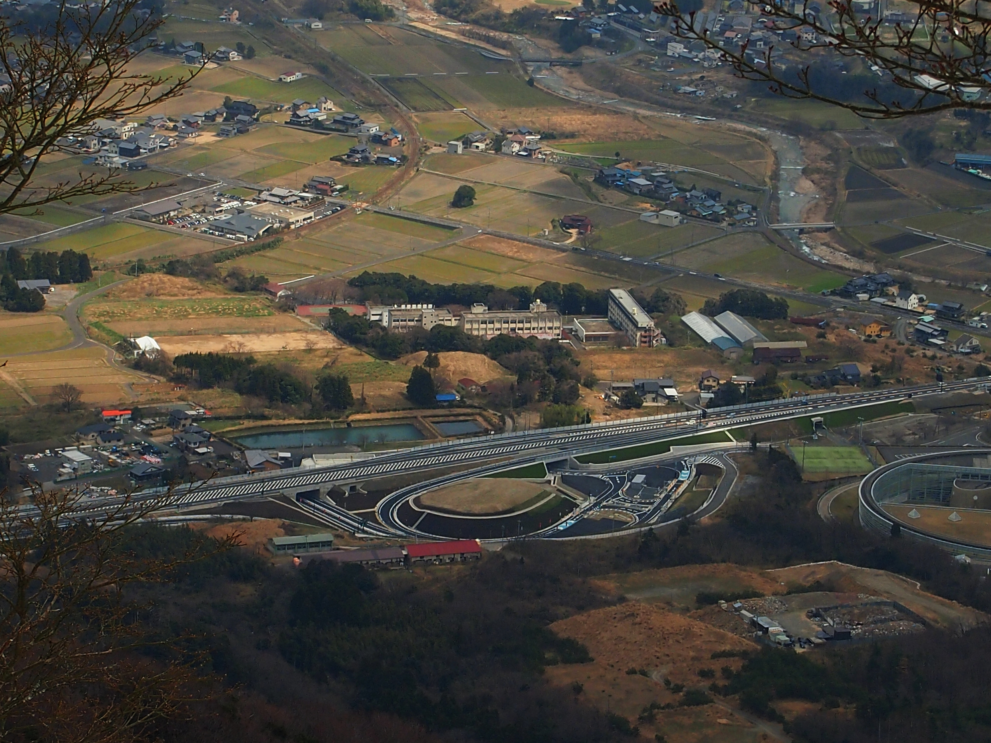 福井県敦賀市の敦賀南スマートインターチェンジ。その上の建物は昭英高等学校